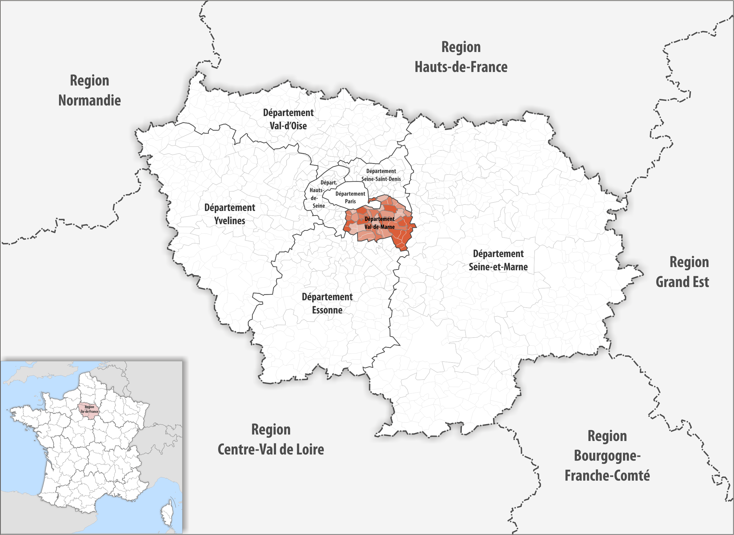 Lage des Departements Val-de-Marne